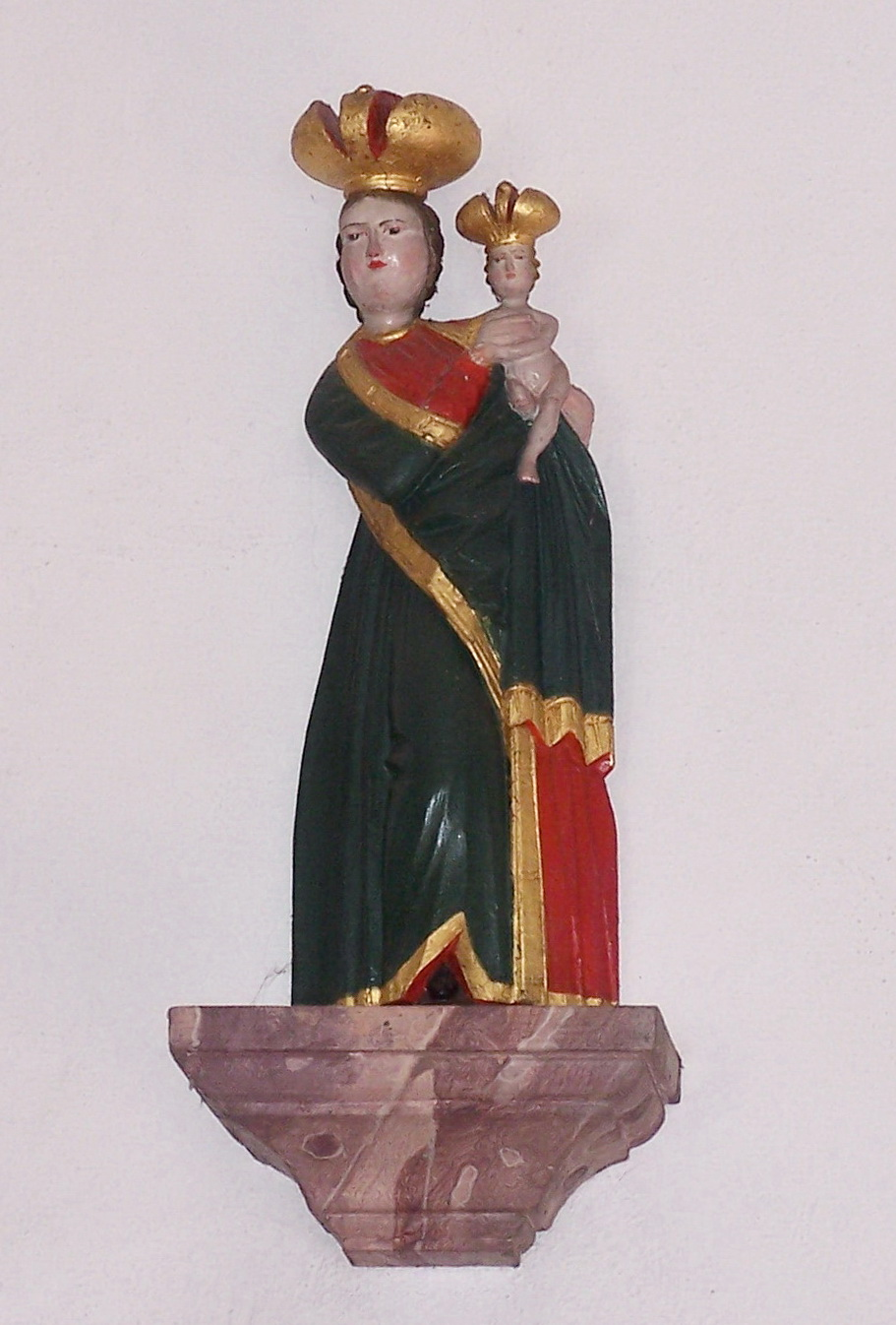 Pfatter, Griesau, Nähe Dorfstraße. Katholische Nebenkirche St. Leonhard. Madonnenfigur mit Jesuskind. Dem Aussehen nach handelt es sich um eine sogenannte Böhmische Holzscheitl-Madonna aus dem 19. Jahrhundert. Auffällig sind die mächtigen Kronen. Figuren dieser Art waren beliebtes Mitbringsel von bayerischen Wallfahrern aus Böhmen.